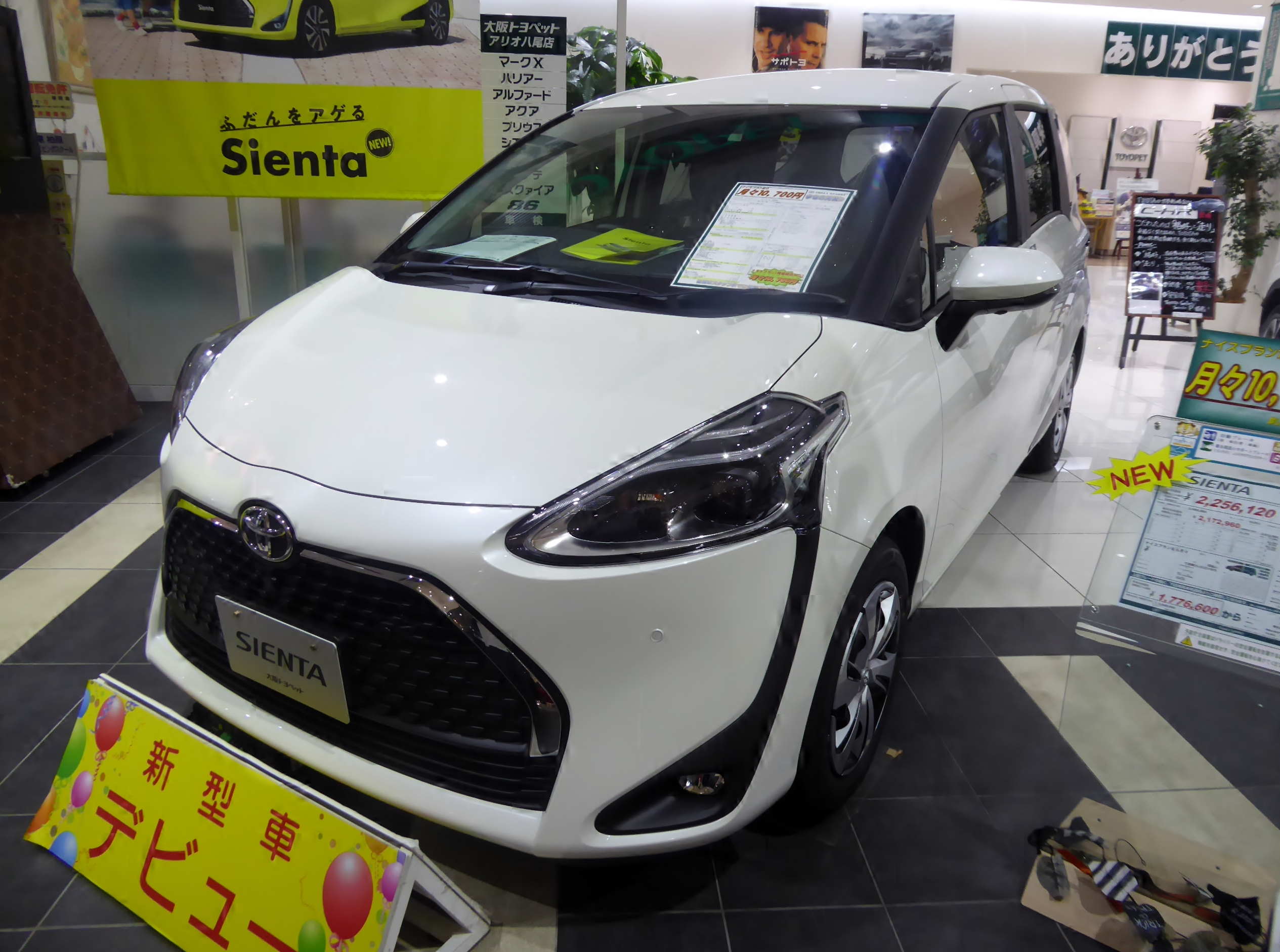 DBA-NSP170G-MWXUB型トヨタ・シエンタG Cueroをフロントから撮影。